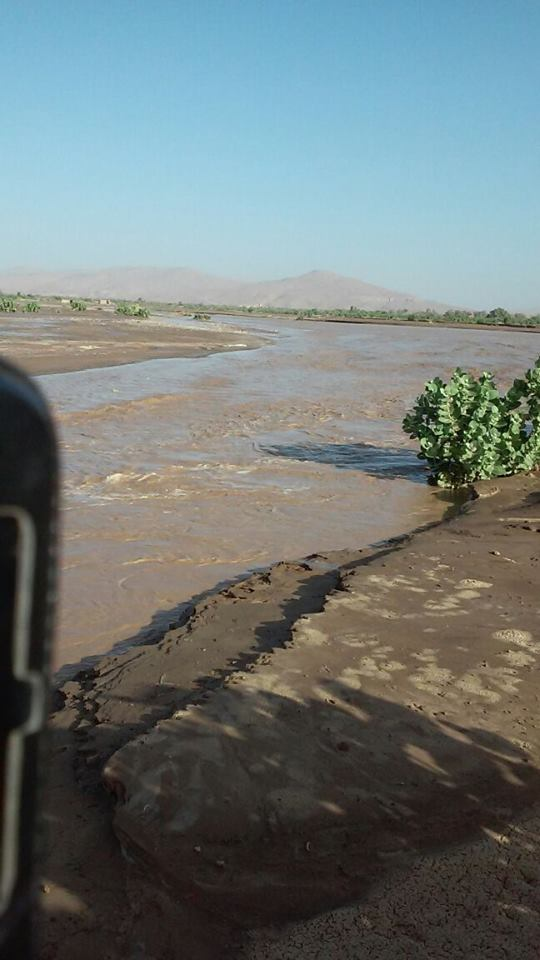 وادي مذاب محافظة الجوف اثناء تدفق السيول عام 2016م